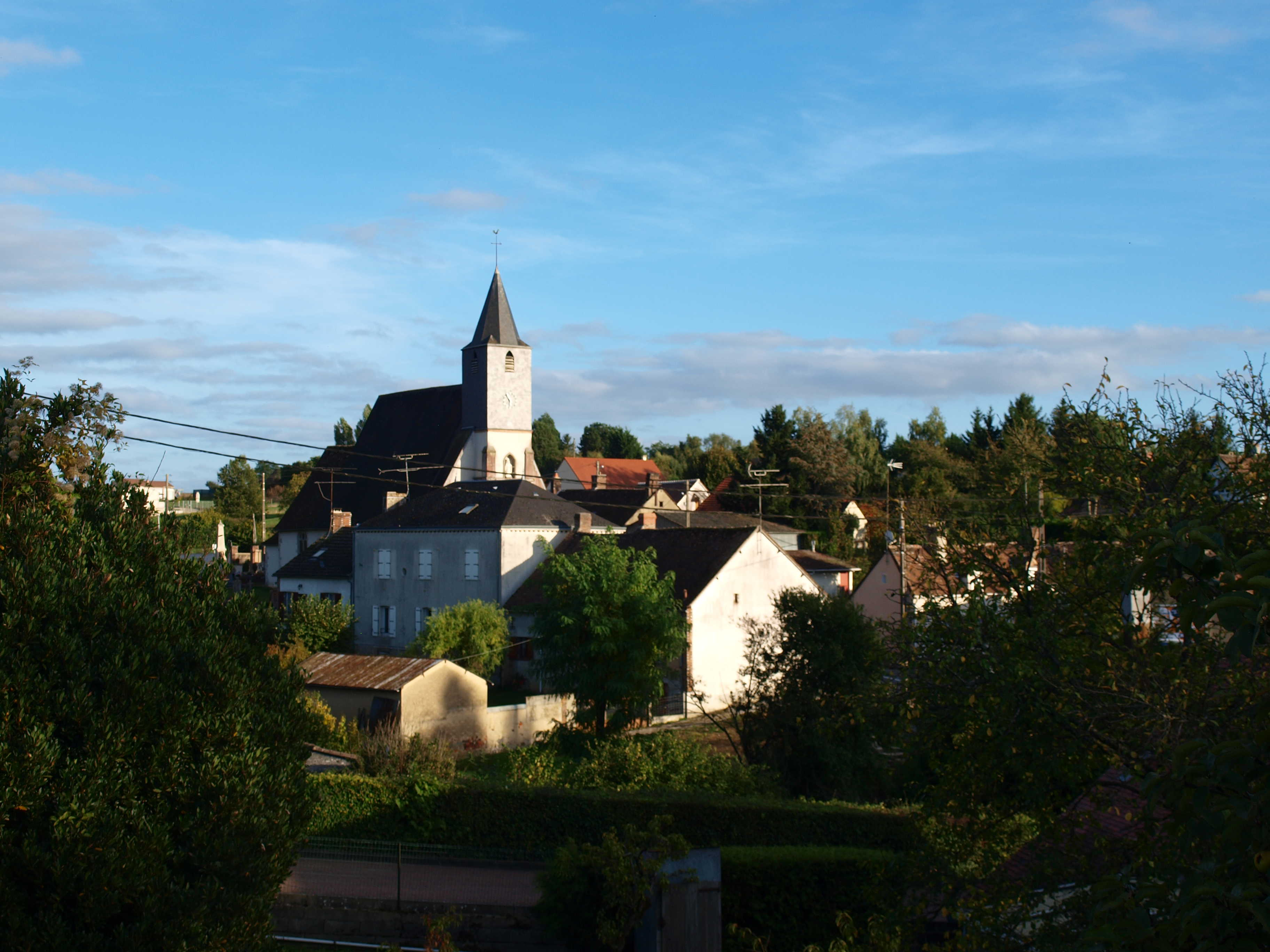 Saint-Firmin-des-Bois (Loiret, France) ; vue du coeur du village depuis l'aire de jeux de la mairie.